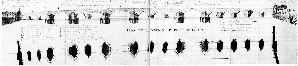 Plan et élévation de l'ancien pont de pierre de Jargeau, par l'ingénieur Mathieu le 25 janvier 1703